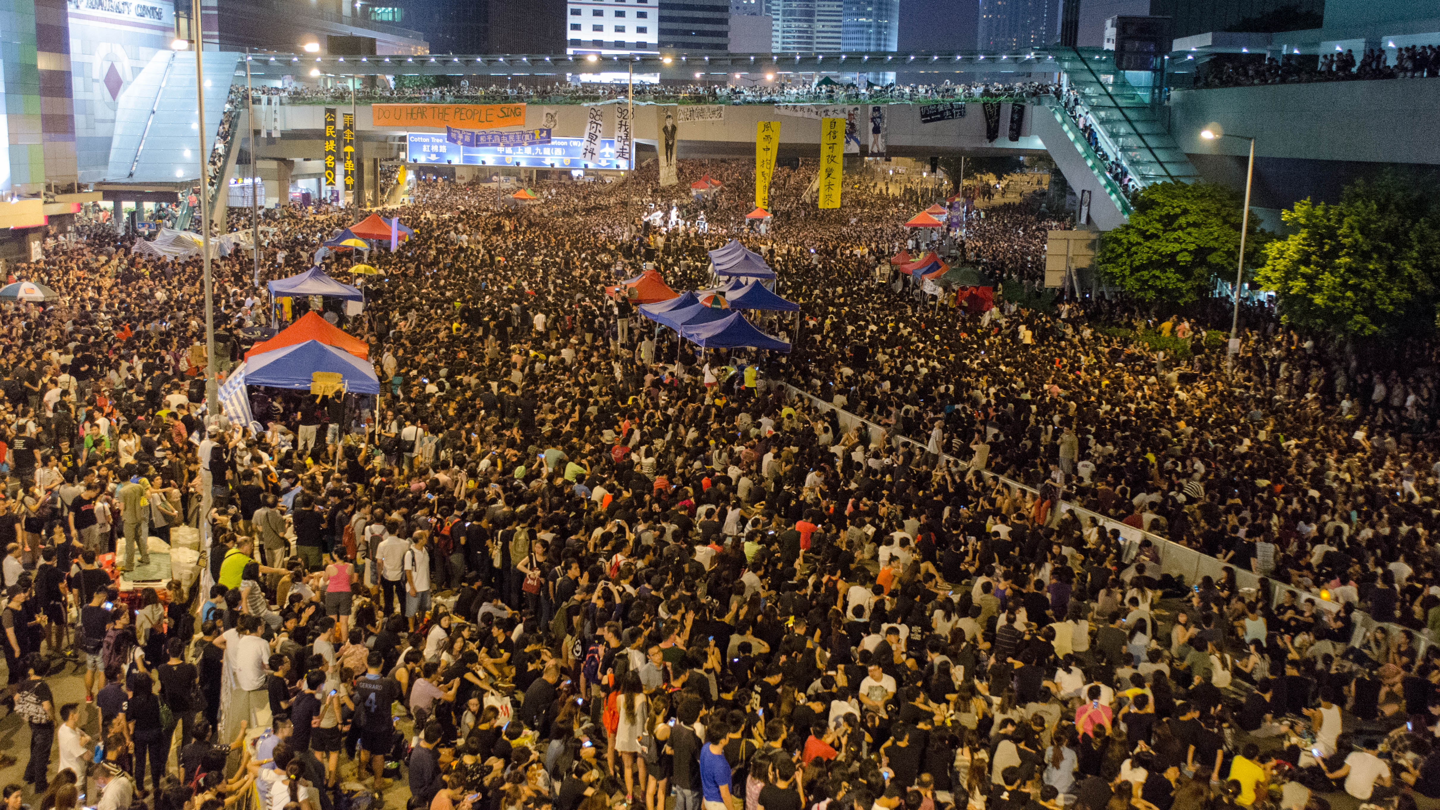 Umbrella Revolution in Admiralty 2014-10-04